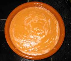 Final look of salmorejo.